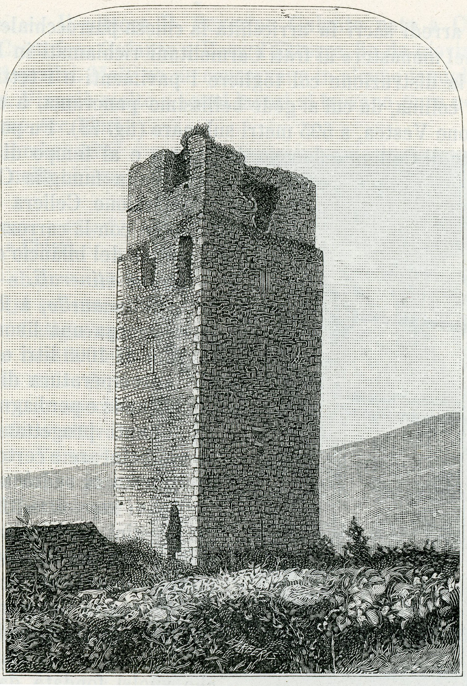 Celiera: torre dell’antico convento di S. Maria Casanova (xilografia di Barberis 1898).